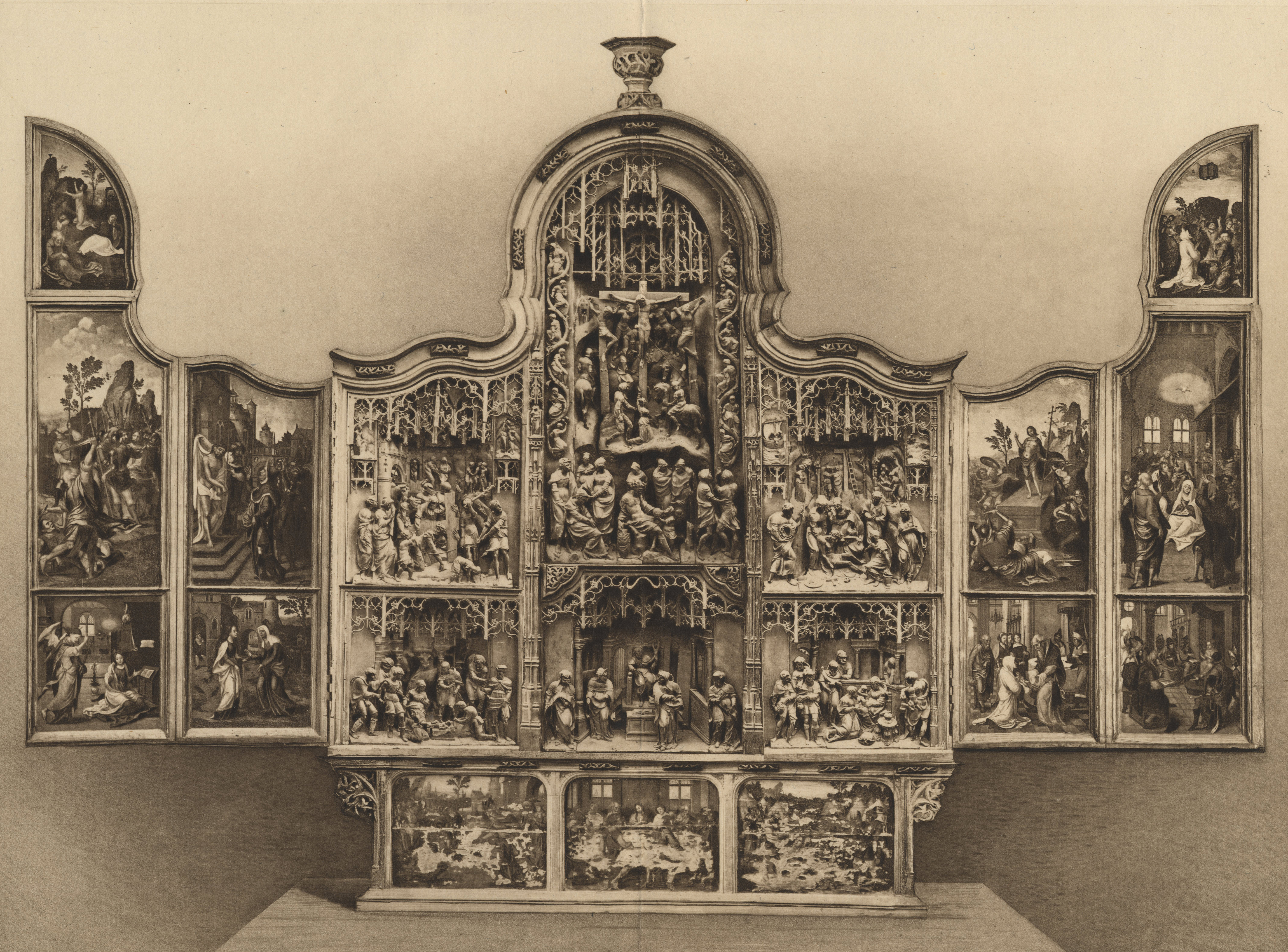 Photographie du retable de Baume-les-Messieurs, vers 1890, avant restauration